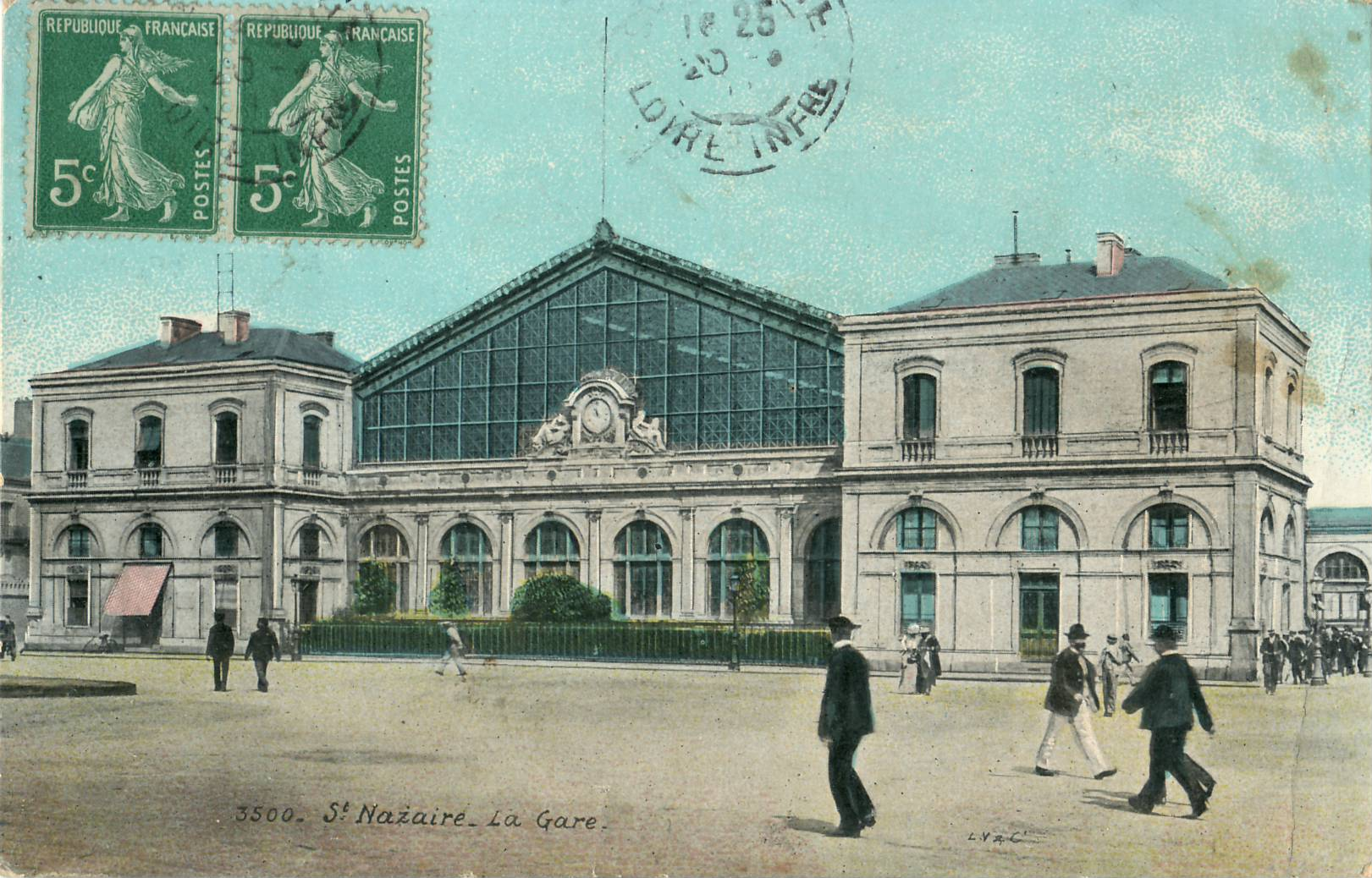 Carte postale ancienne édité par L. V. & Cie, n°3500 :SAINT-NAZAIRE - La Gare